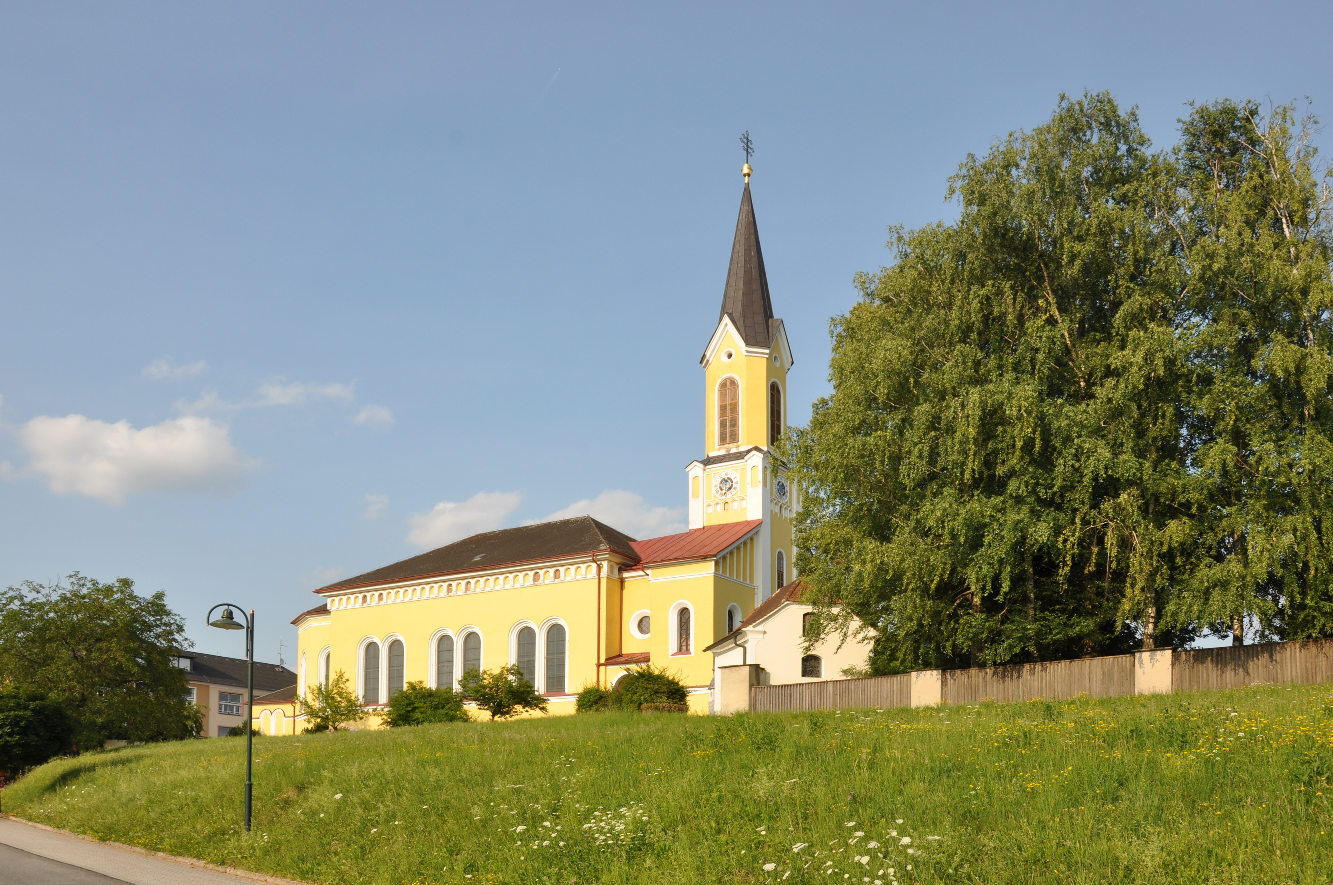 Kath. Pfarrkirche hl. Johannes d. T. mit Kirchhof